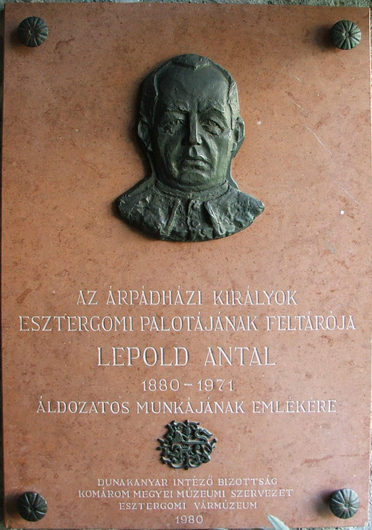 Lepold Antal emléktáblája